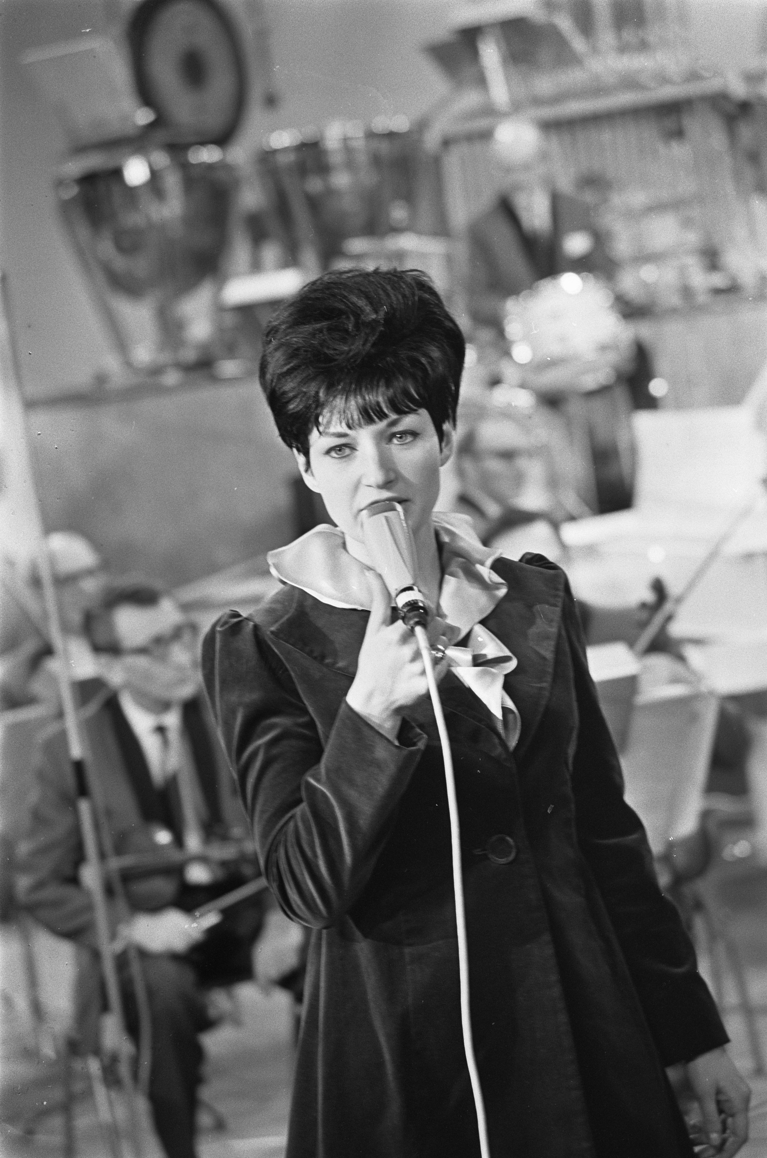 Collectie / Archief : Fotocollectie Anefo Reportage / Serie : Grand Gala du Disque 1968 Beschrijving : Grand Gala du Disque in RAI. Sandy Posey tijdens repetitie Datum : 6 maart 1968 Locatie : Amsterdam Trefwoorden : zangers Persoonsnaam : Posey, Sandy Instellingsnaam : RAI Fotograaf : Nijs, Jac. de / Anefo Auteursrechthebbende : Nationaal Archief Materiaalsoort : Negatief (zwart/wit) Nummer archiefinventaris : bekijk toegang 2.24.01.05 Bestanddeelnummer : 921-1404